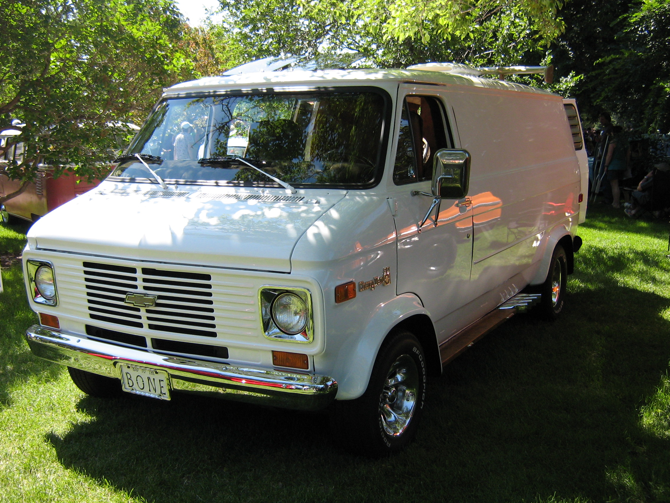 1977 Chevrolet Van